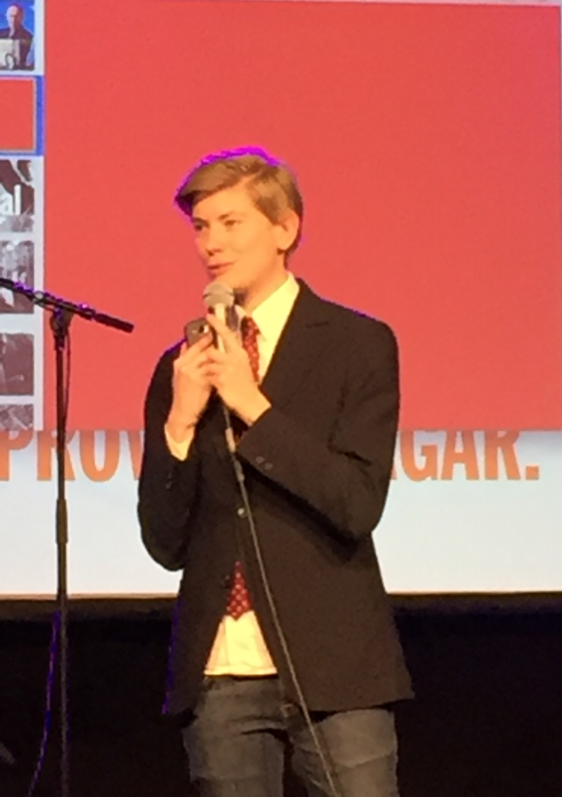 Moa Svan uppträder på ETC:s 40-årsjubileum 2016-12-03 i Färgfabriken, Liljeholmen